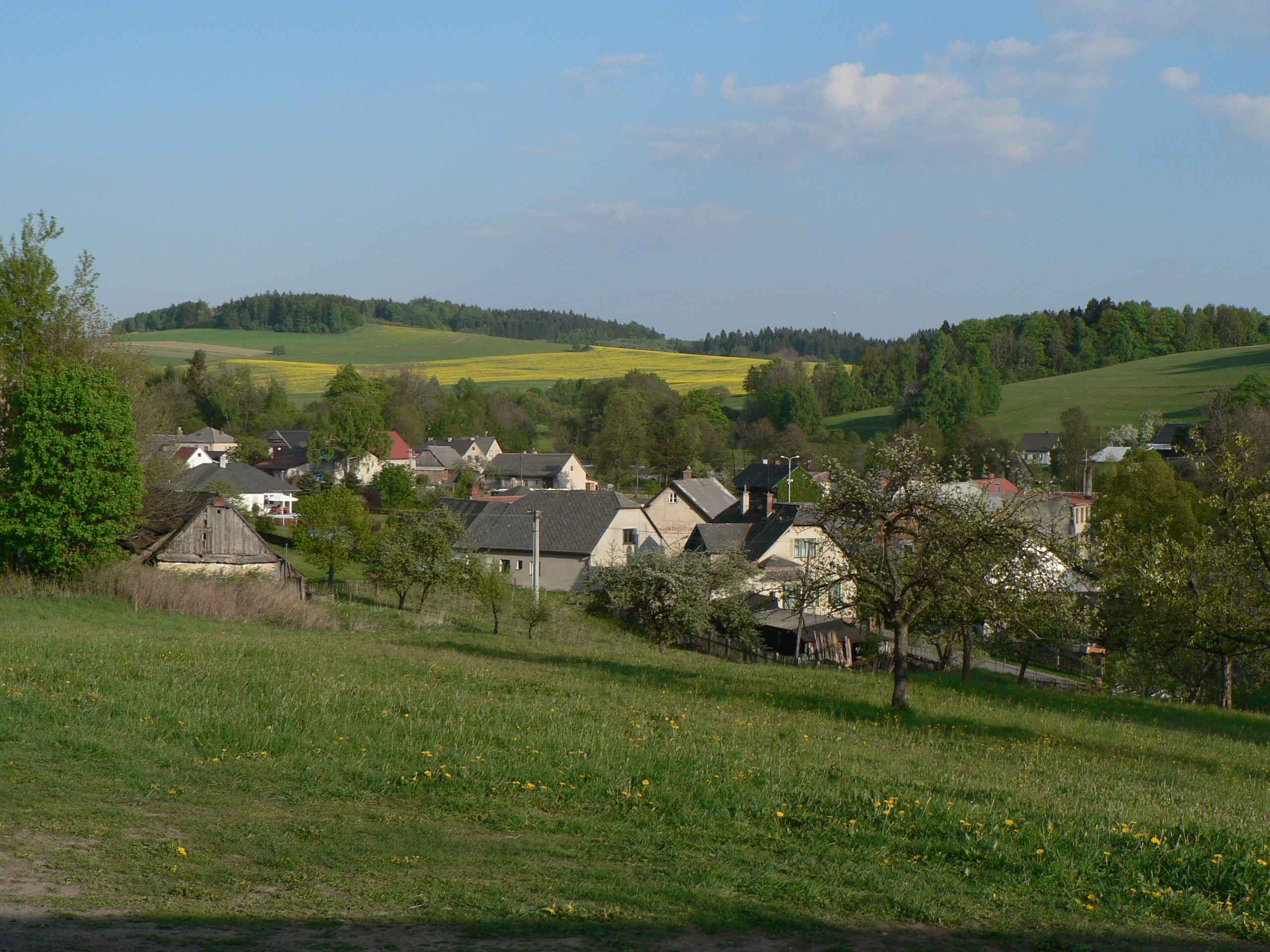 Horní Heřmanice, pohled od kostela